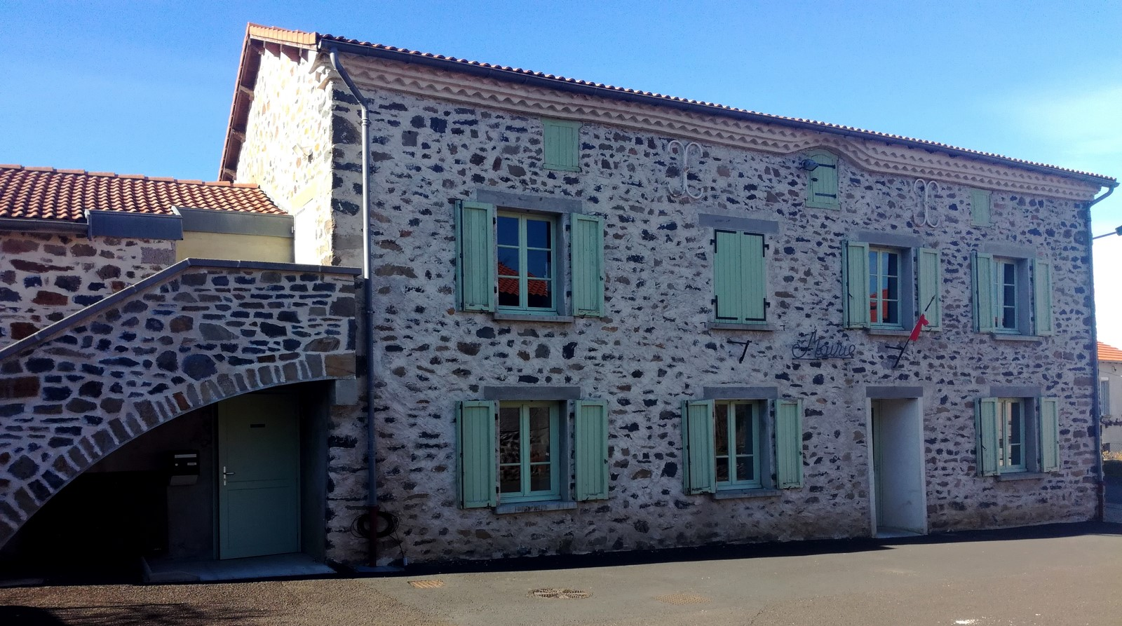 Mairie de Lubilhac, Haute-Loire, France